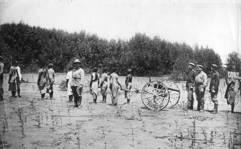 MG-Abteilung des Kreuzers "Königsberg" bei Kiomboni 1. Weltkrieg 1914-18. Der Krieg in den Kolonien-Deutsch-Ostafrika (Tansania): Der deutsche Kleine Kreuzer "Königsberg" wird am 15.7.1915 nach schweren Artilleriekämpfen mit britischen Schiffen in Rufijidelta von der Besatzung versenkt. Die Mannschaft beteiligt sich danach an den Landkämpfen; MG-Abteilung der "Königsberg" auf dem Marsch in der Nähe des Küstenortes Kiomboni, Bezirk Kilewa.